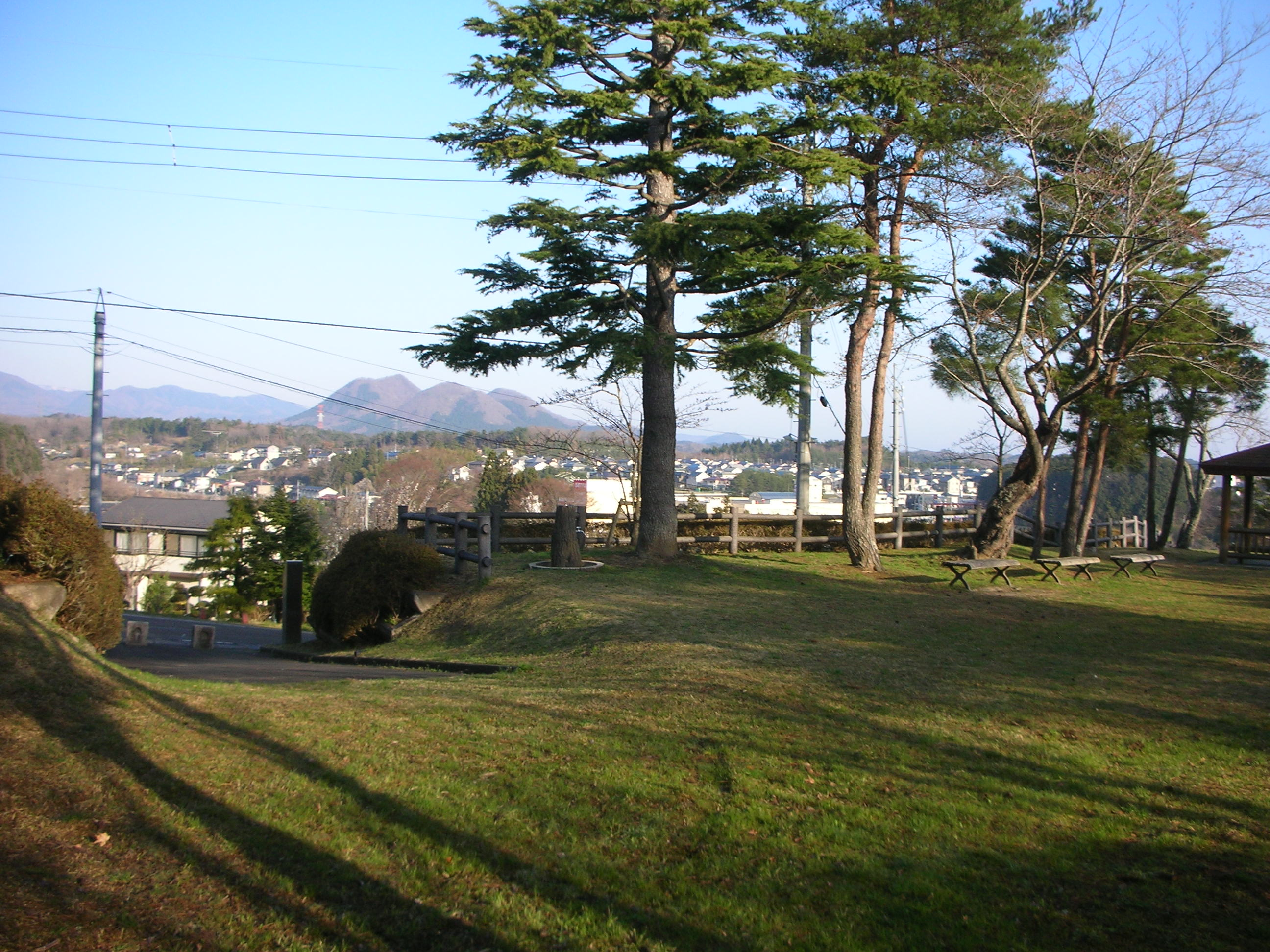 富ヶ岡公園から七ツ森を望む